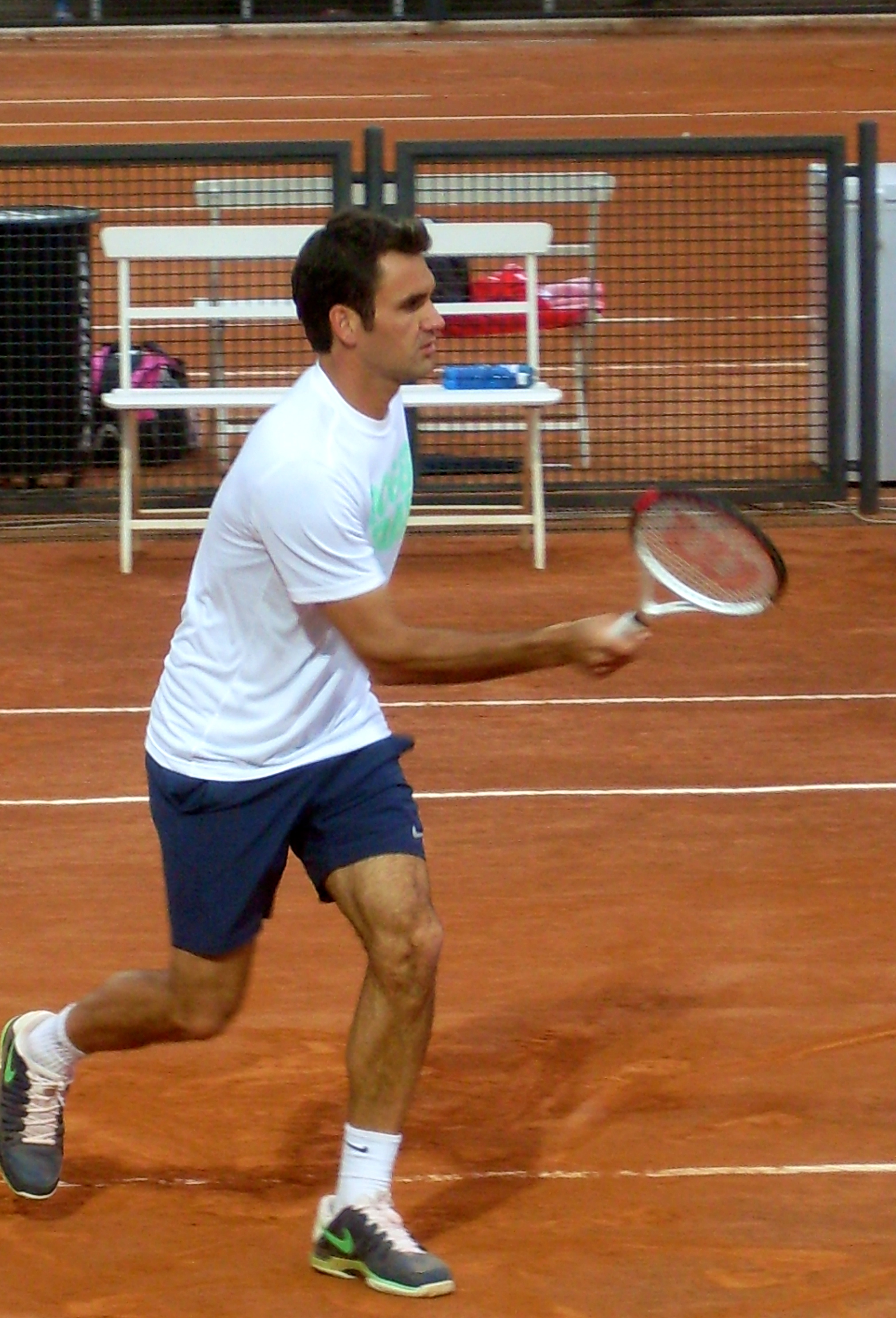 Federer mentre si allena a Roma